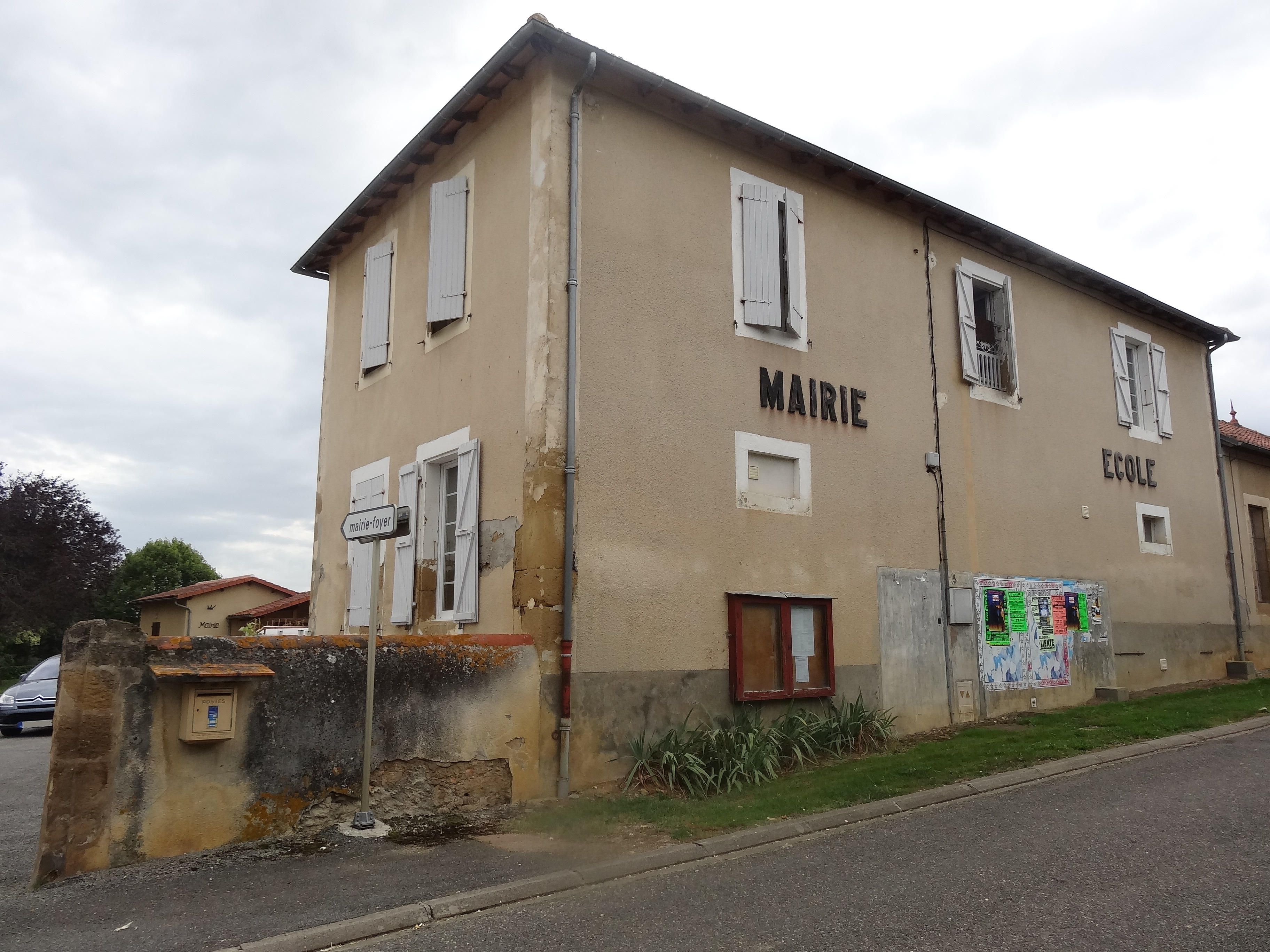 Ancienne mairie-école de Sadeillan.